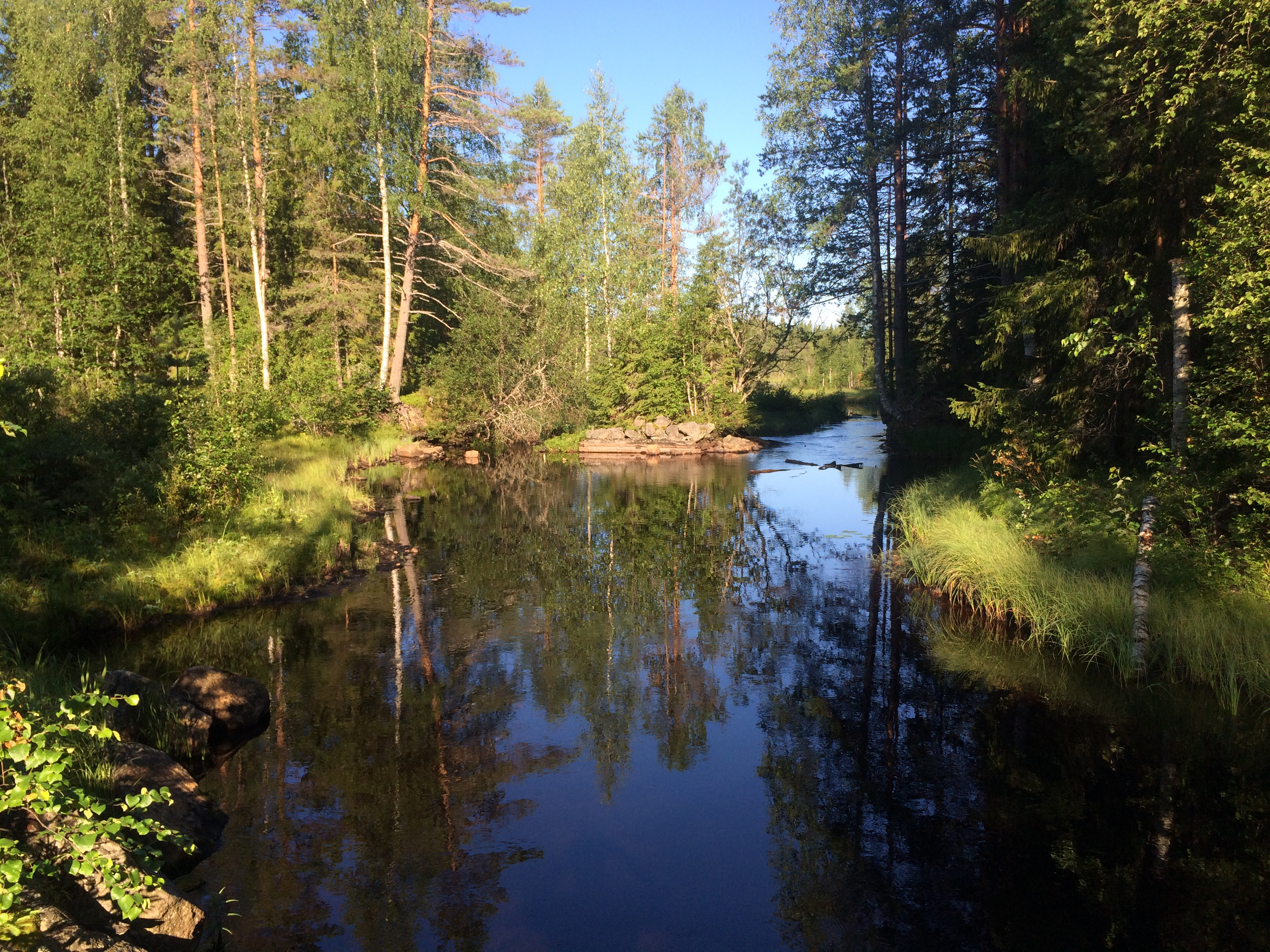 Ирста